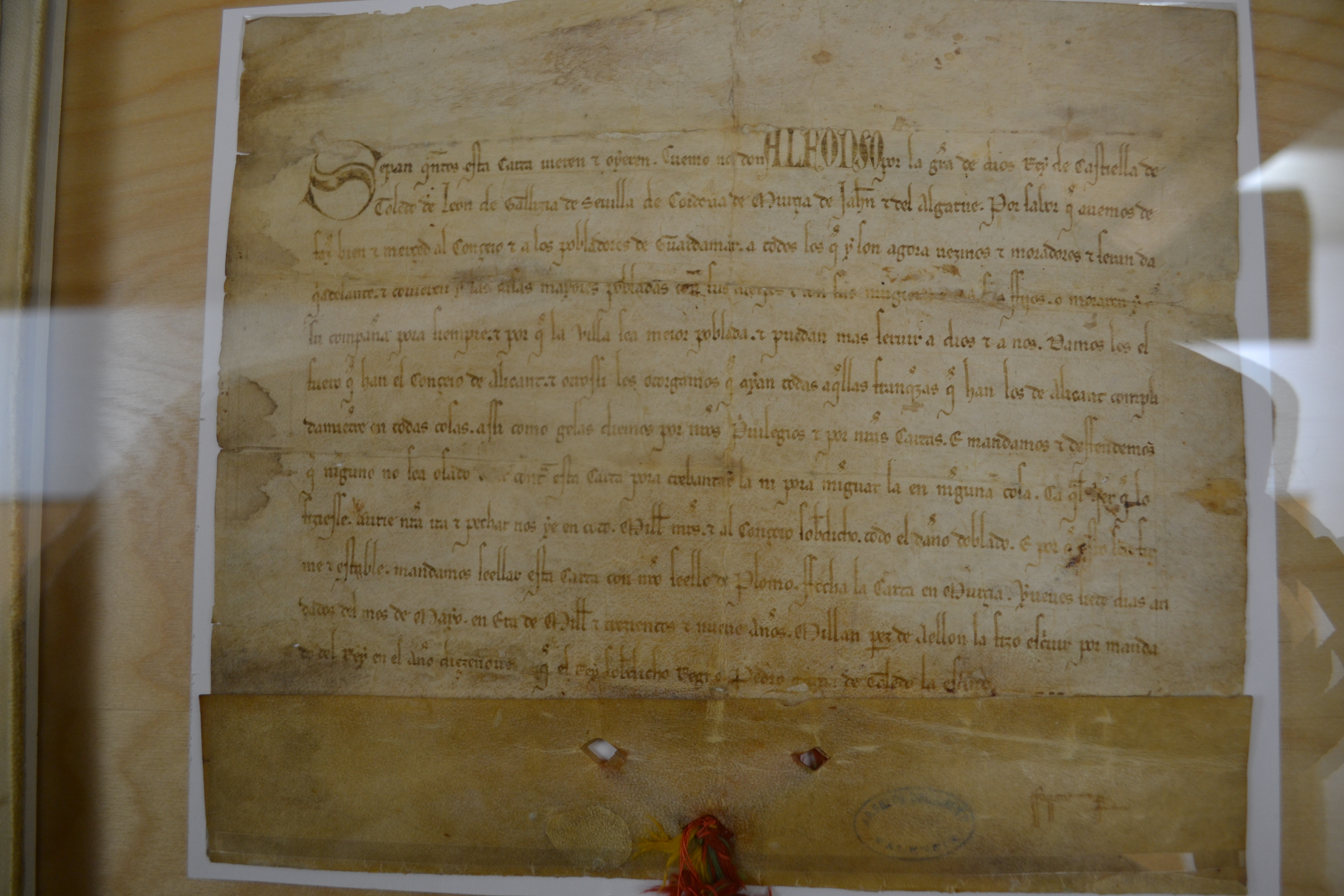 Fur de Guardamar del Segurar atorgat per Alfons X: Alfons X, rei de Castella concedeix a la vila de Guardamar el fur d'Alacant, així com totes les seues franqueses (7 de maig de 1271). ARV: Pegamins reials, núm. 4. Arxiu del Regne de València.